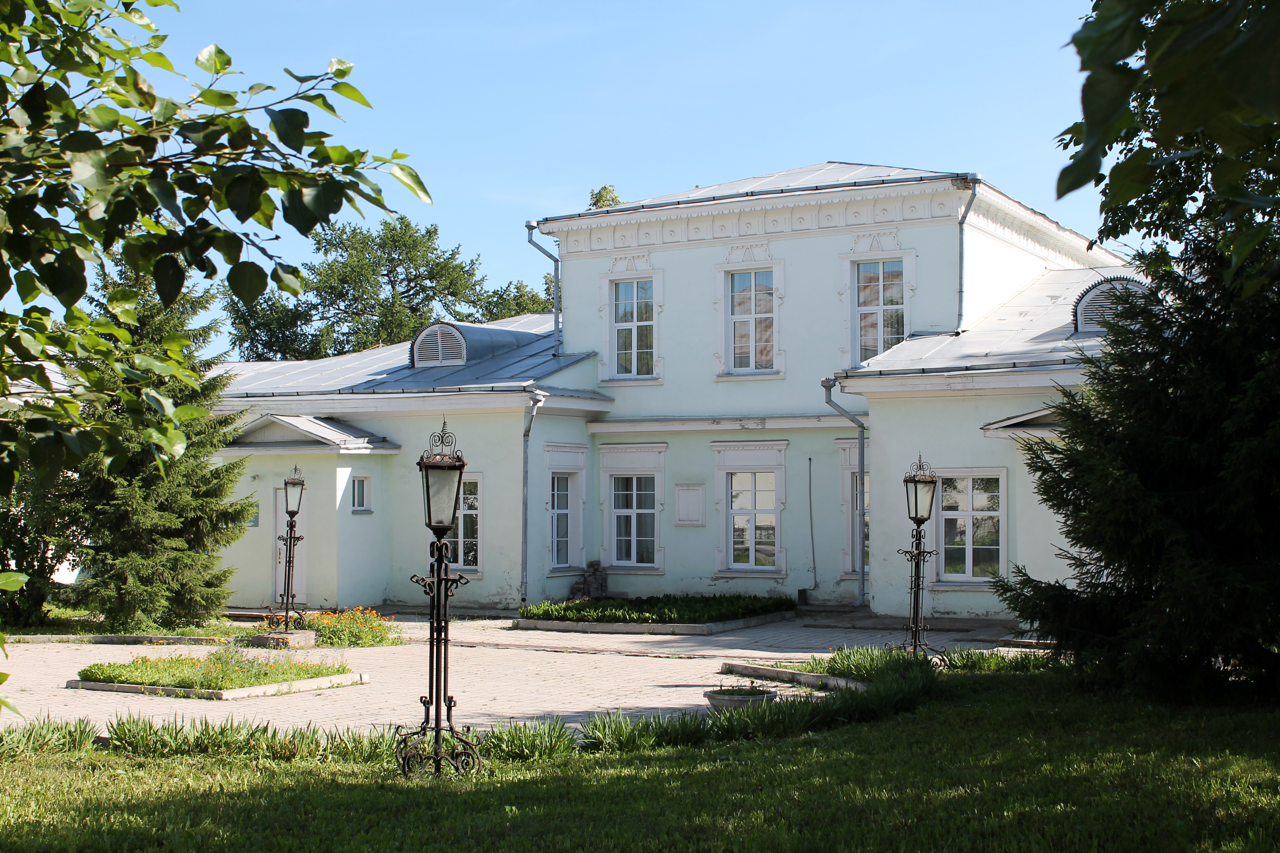 Дом, в котором в 1849-1851 гг. жил композитор П.И. Чайковский Алапаевск, улица Ленина, 30